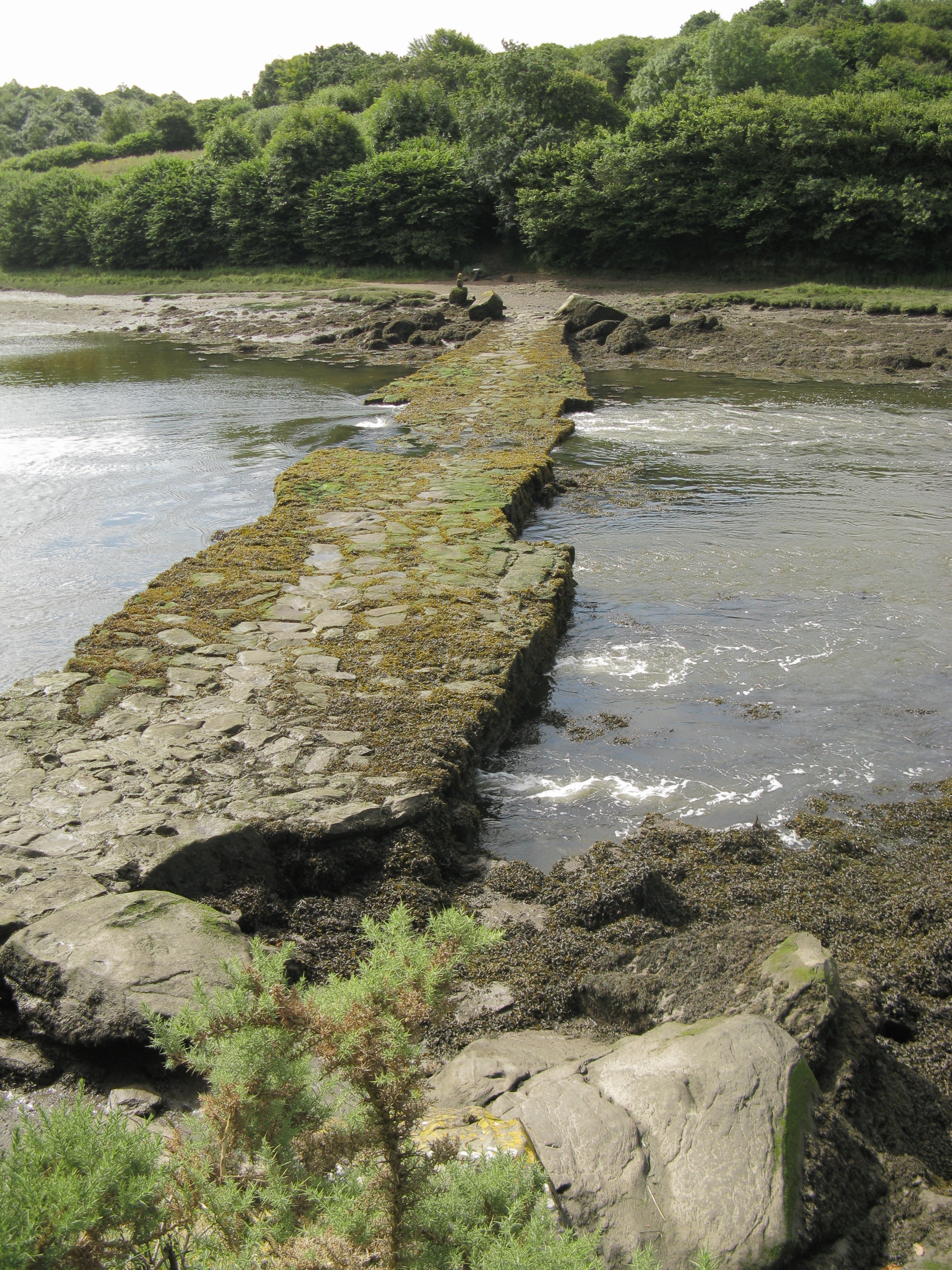 De "Pont du Diable" over de zee-inham Aber Wrac'h in Plouguerneau, Bretagne.